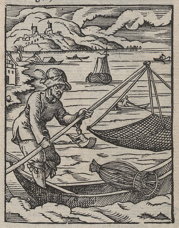 Original image description from the Deutsche Fotothek Ständebuch & Fischer & Reuse